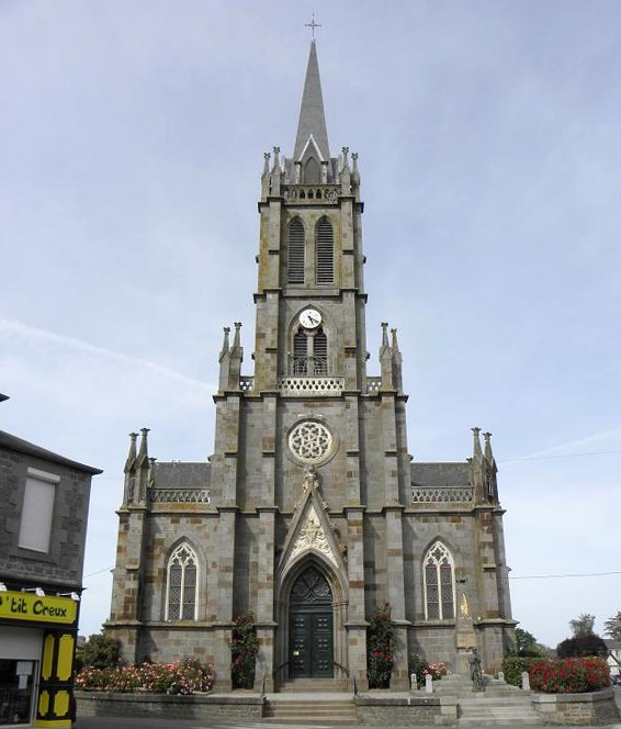 Église Sainte-Trinité et Saint-Augustin de Plerguer (35).